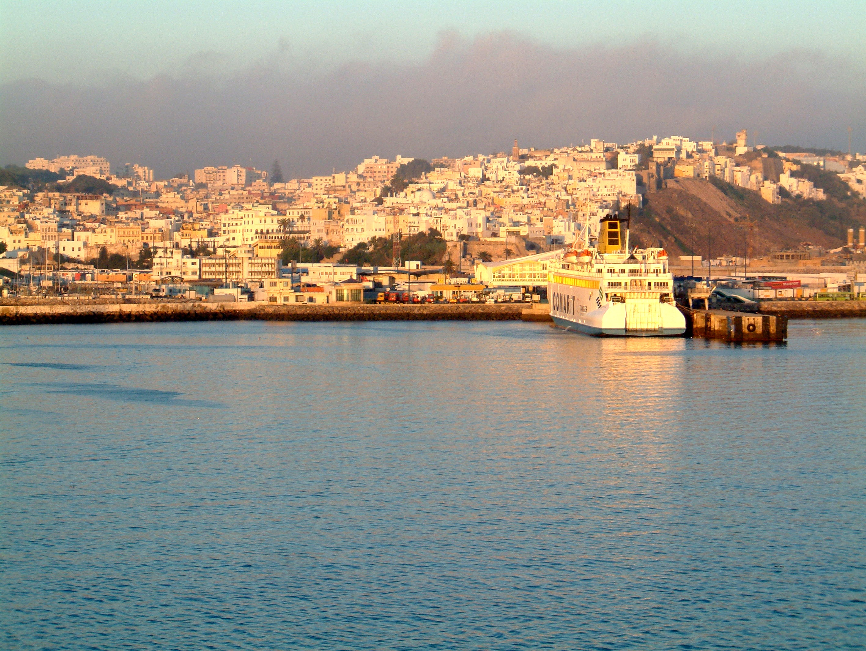 Blick auf Tanger